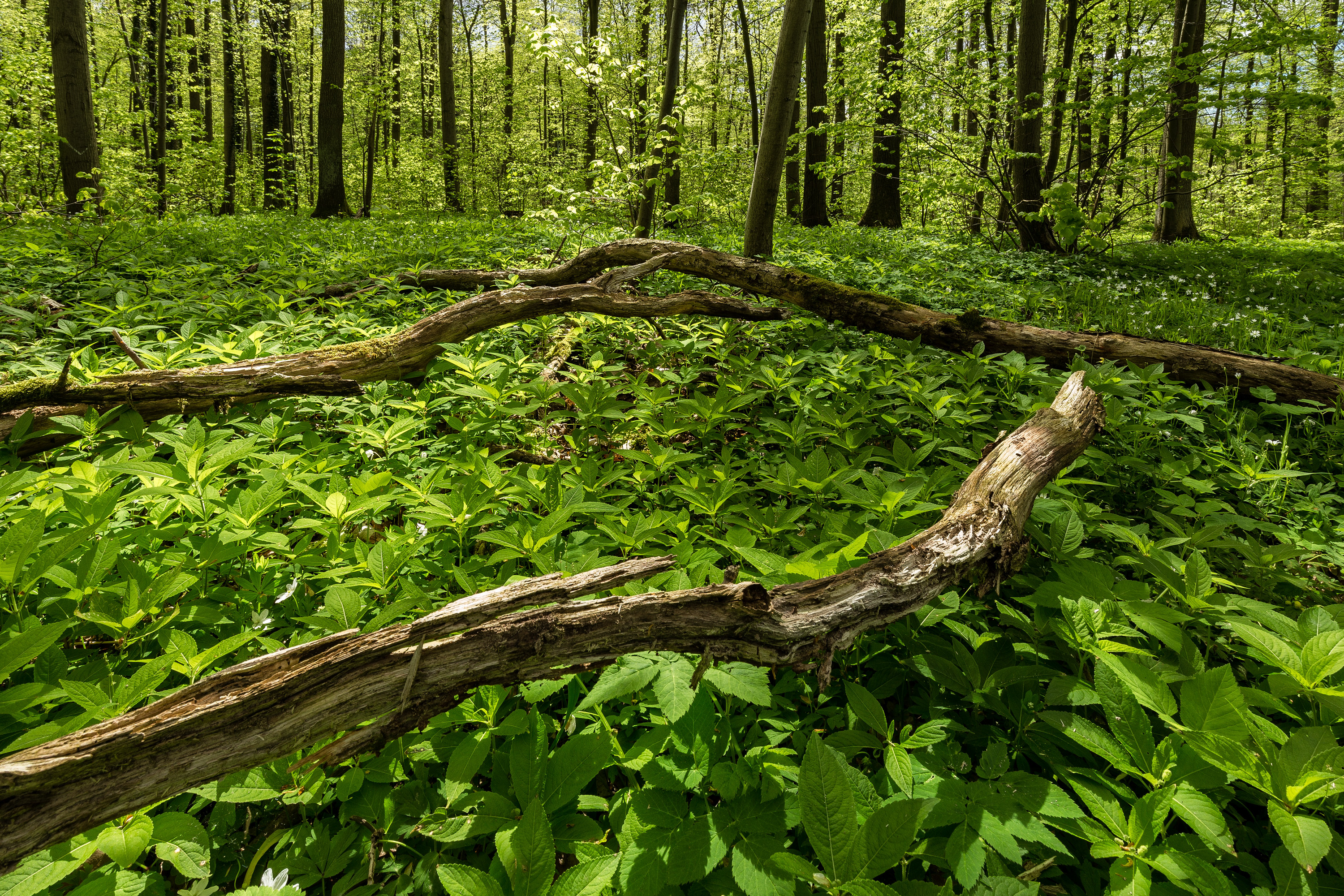 Naturschutzgebiet Maaßeler Lindenwald, Landkreis Gifhorn, Deutschland